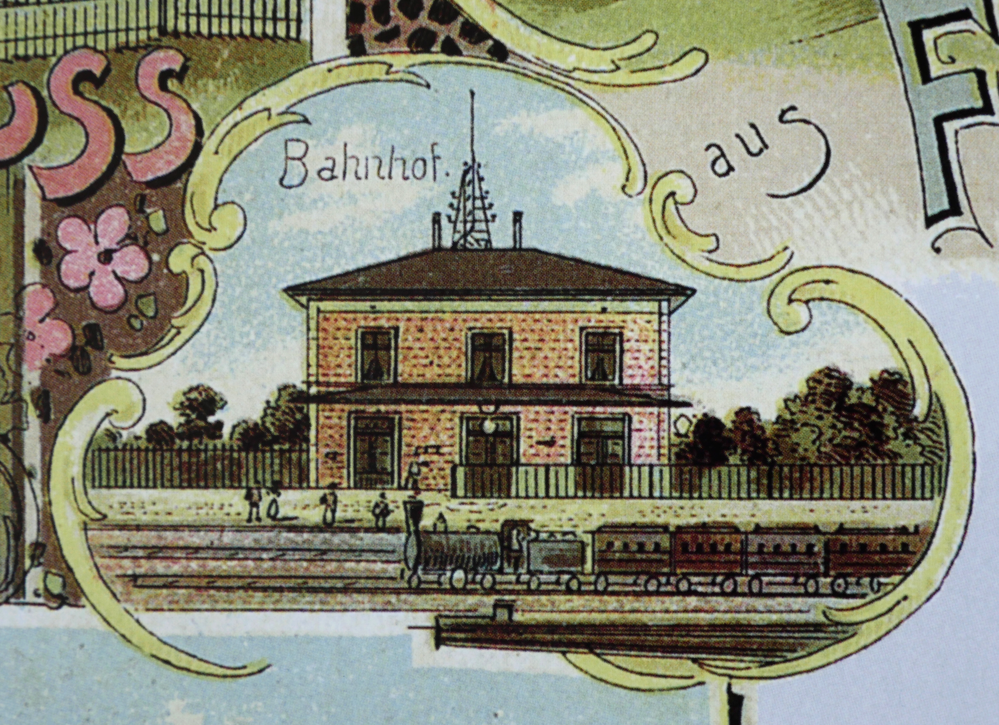 Empfangsgebäude des Bahnhofs Feldkirchen, davor ein dampflokbespannter Personenzug. Ausschnitt aus einer Ansichtskarte von 1898.